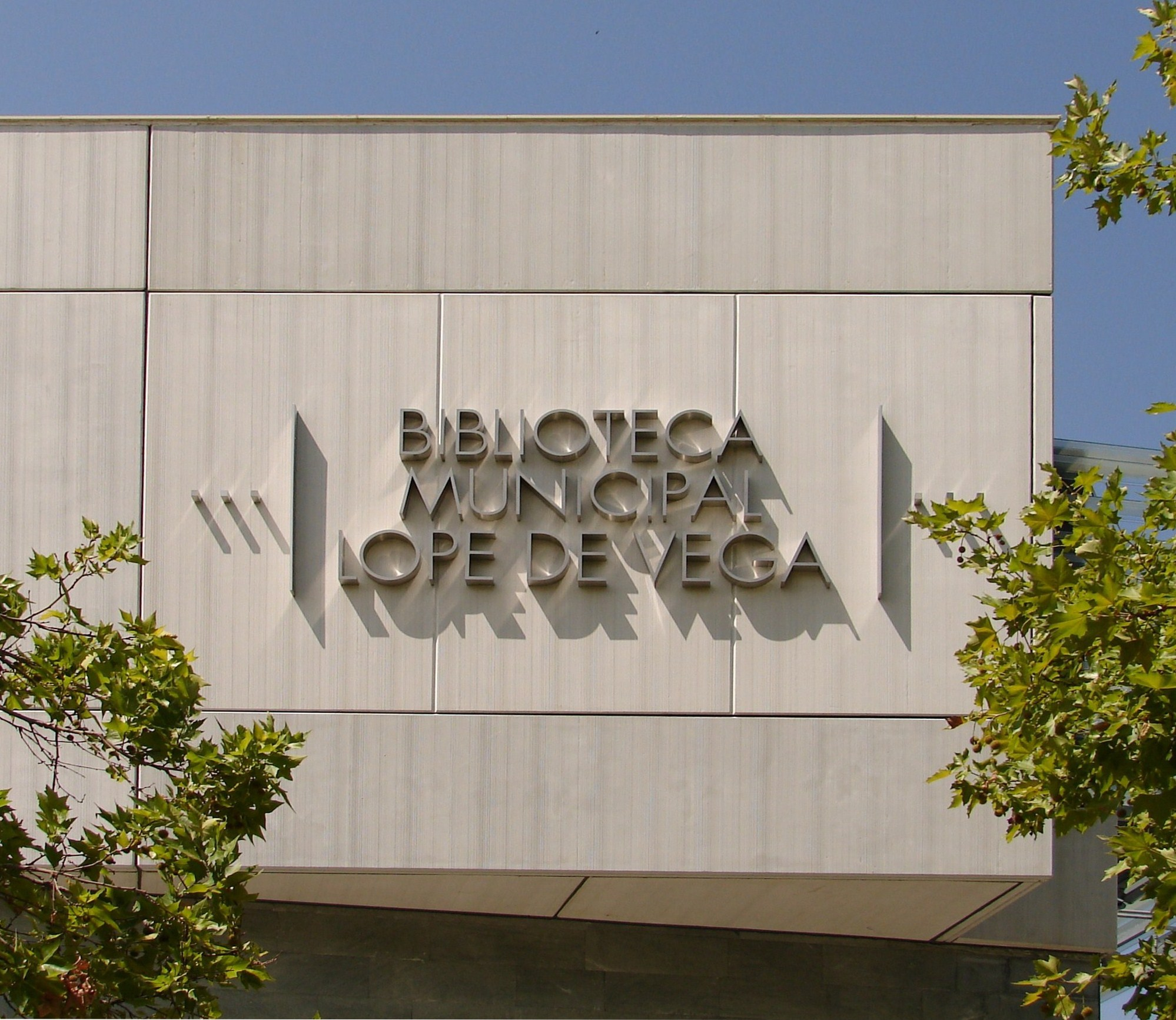 Biblioteca Municipal - Public Library - Lope de Vega (Tres Cantos) -Madrid